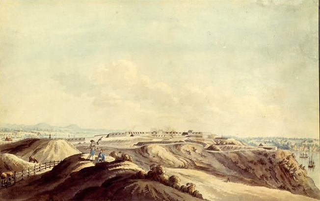 Représentation des plaines d'Abraham par J. Peachey, 1784